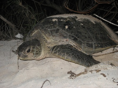 Penyu hijau bersiap-siap kembali ke laut setelah selesai bertelur di Pulau Anano, Kepulauan Wakatobi, Sulawesi Tenggara. Author: Asti Wasistini.